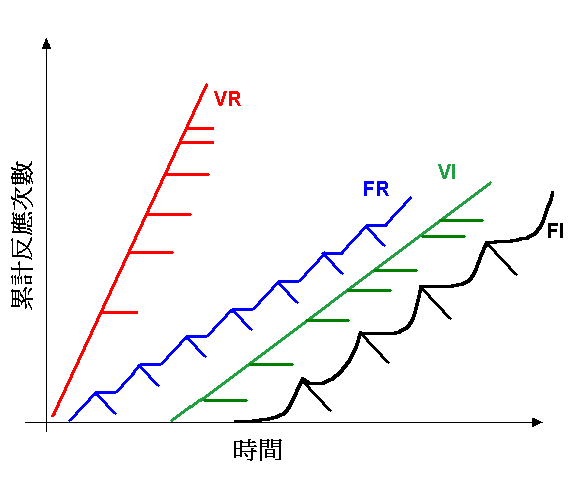 對於增強的不同反應